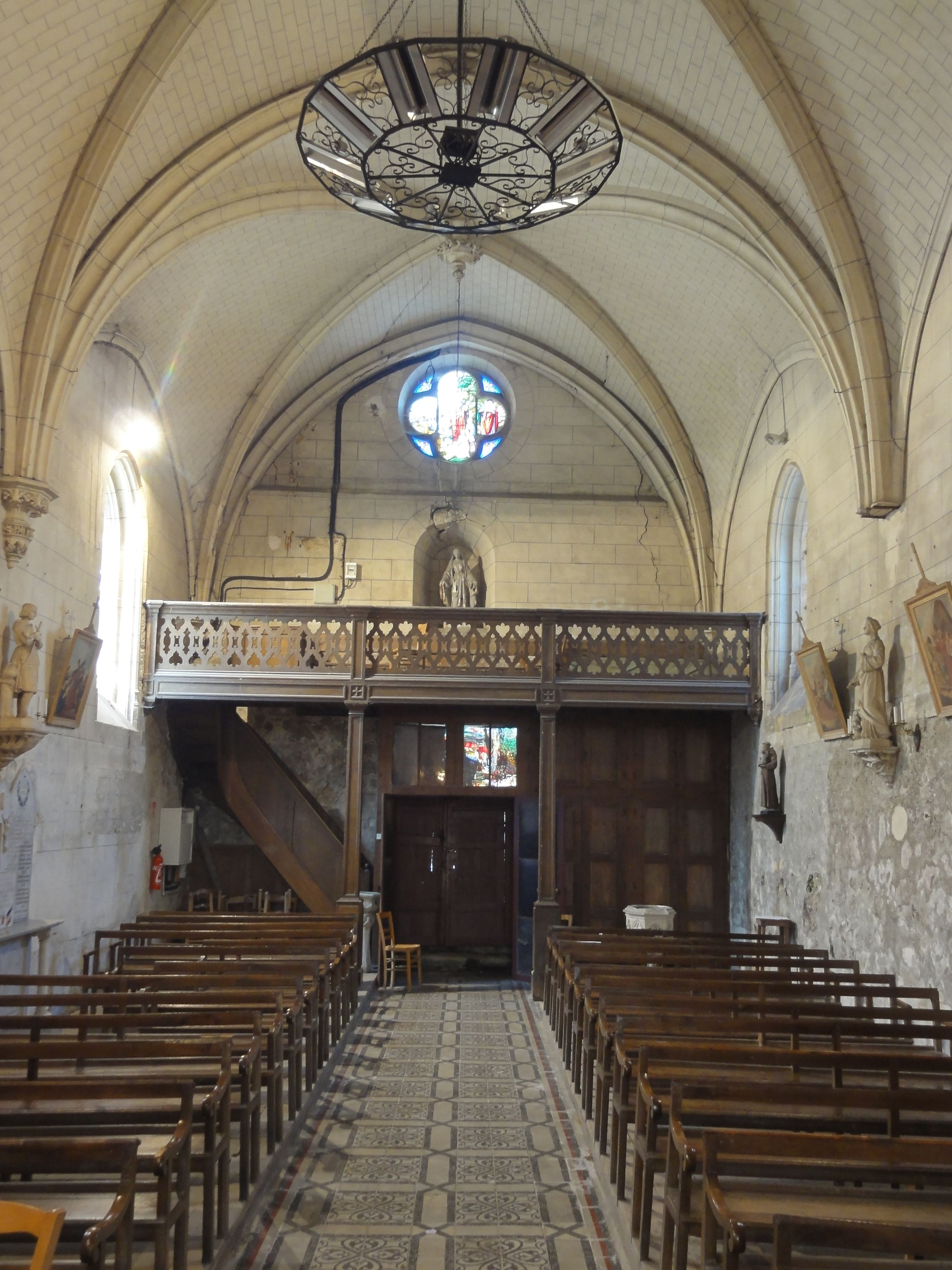 Nef, vue vers l'ouest.